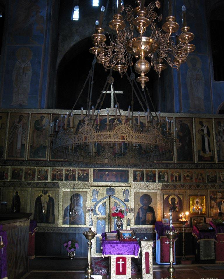 Усередині_Василівського_храму_в_Овручі.jpg: Усередині Свято-Василівського собору в Овручі, серпень 2008